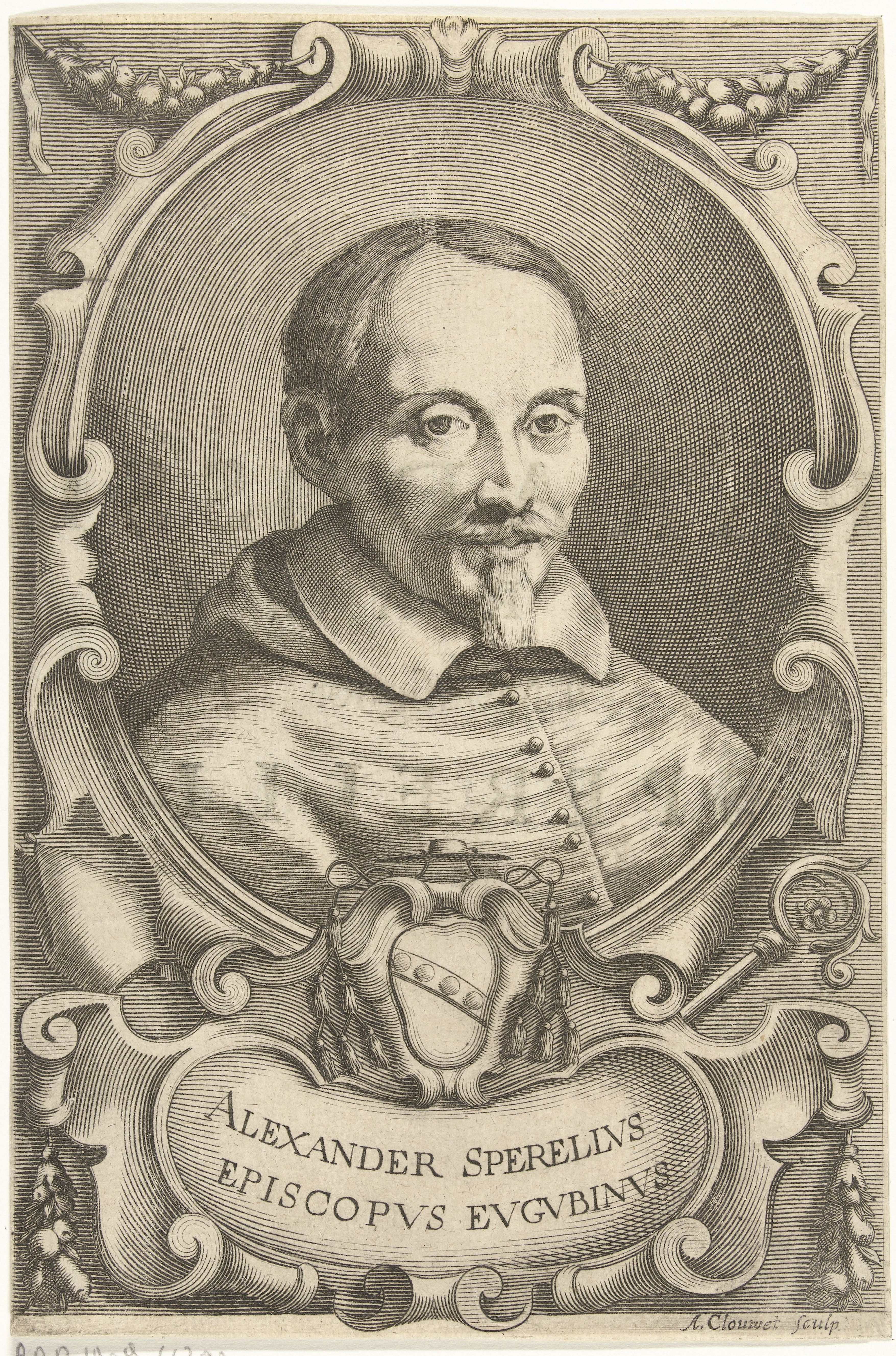 IdentificatieTitel(s): Portret van bisschop Alessandro SperelliObjecttype: prent boekillustratie Objectnummer: RP-P-1909-4392Opschriften / Merken: verzamelaarsmerk, verso midden, gestempeld: Lugt 2228Omschrijving: Cartouche met Portret in ovale lijst van Alessandro Sperelli, bisschop van Gubbio. Buste naar rechts. Midden onder het wapen van Alessandro Sperelli.VervaardigingVervaardiger: prentmaker: Albertus Clouwet (vermeld op object)naar eigen ontwerp van: Albertus ClouwetPlaats vervaardiging: RomeDatering: 1666 - 1679Fysieke kenmerken: gravureMateriaal: papier Techniek: graveren (drukprocedé)Afmetingen: blad: h 199 mm × b 132 mmToelichtingillustratie voor Alessandro Sperelli, "Paradossi morali", 1666OnderwerpWie: Allessandro SperelliVerwerving en rechtenVerwerving: aankoop 1905Copyright: Publiek domein